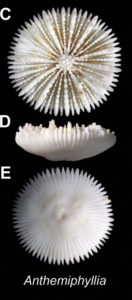 Recorte de archivo Commons ZooKeys 227-001-g022